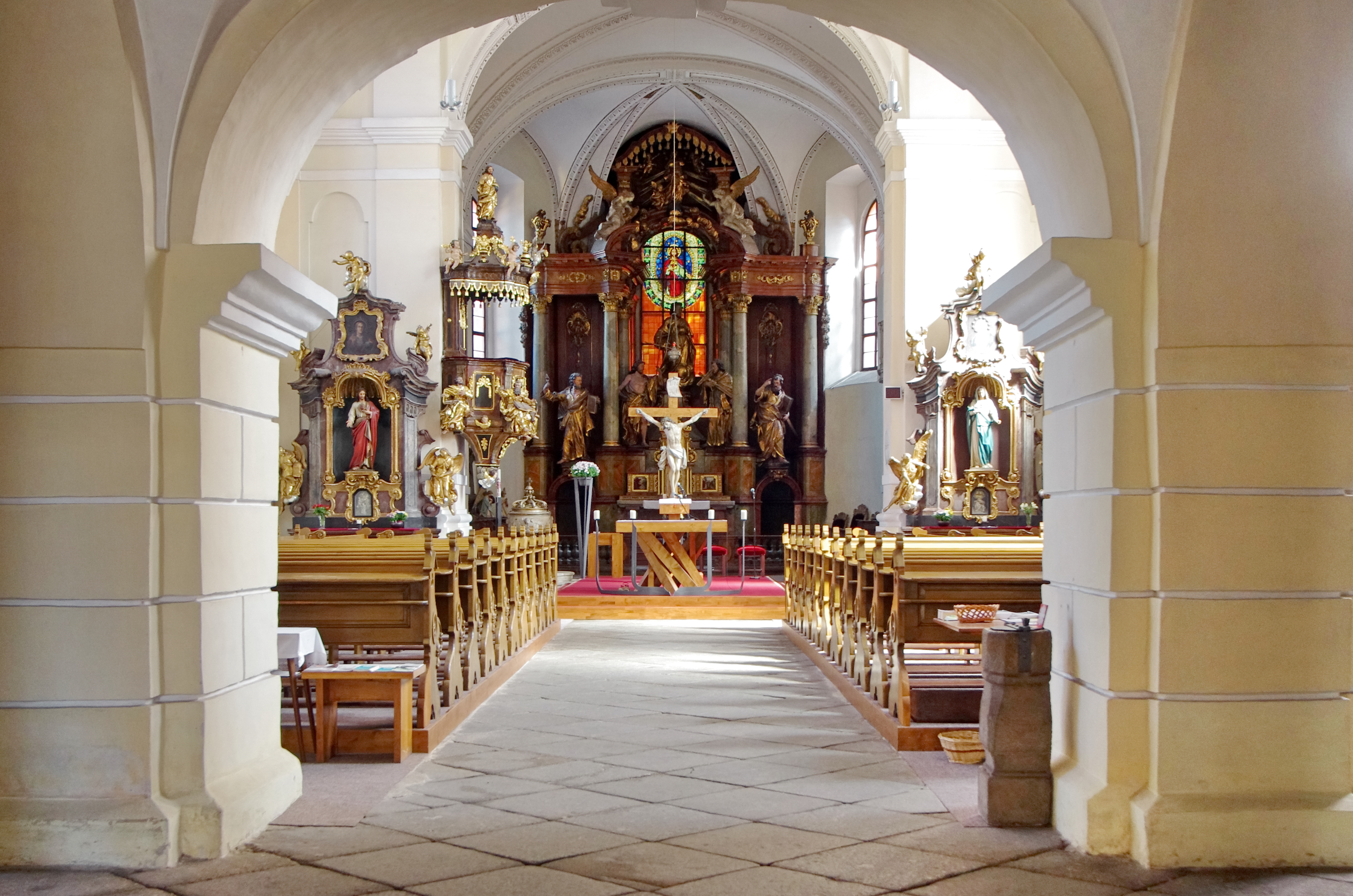 Kostel svatého Jakuba, Staré náměstí čp. 1, Růžové náměstí, Sokolov.